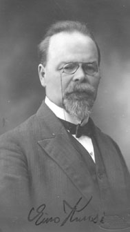 Eino Akseli Kuusi, soome majandusteadlane